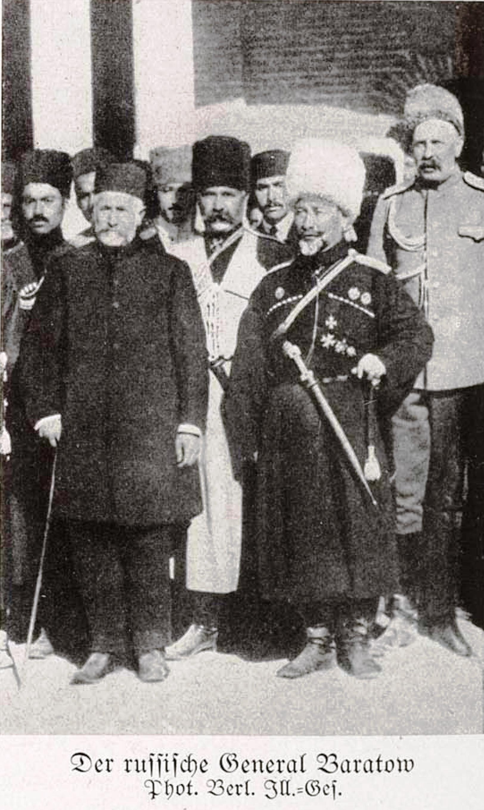 Die Kaukasusfront